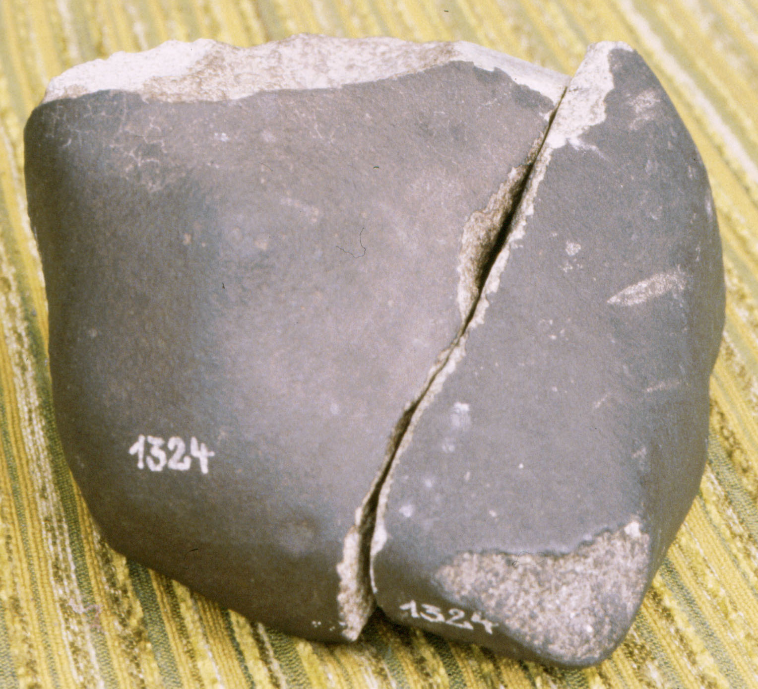 Die Fundstücke Beverbruch (11,7 kg) und Bissel (4,8 kg) des Oldenburg Meteoriten